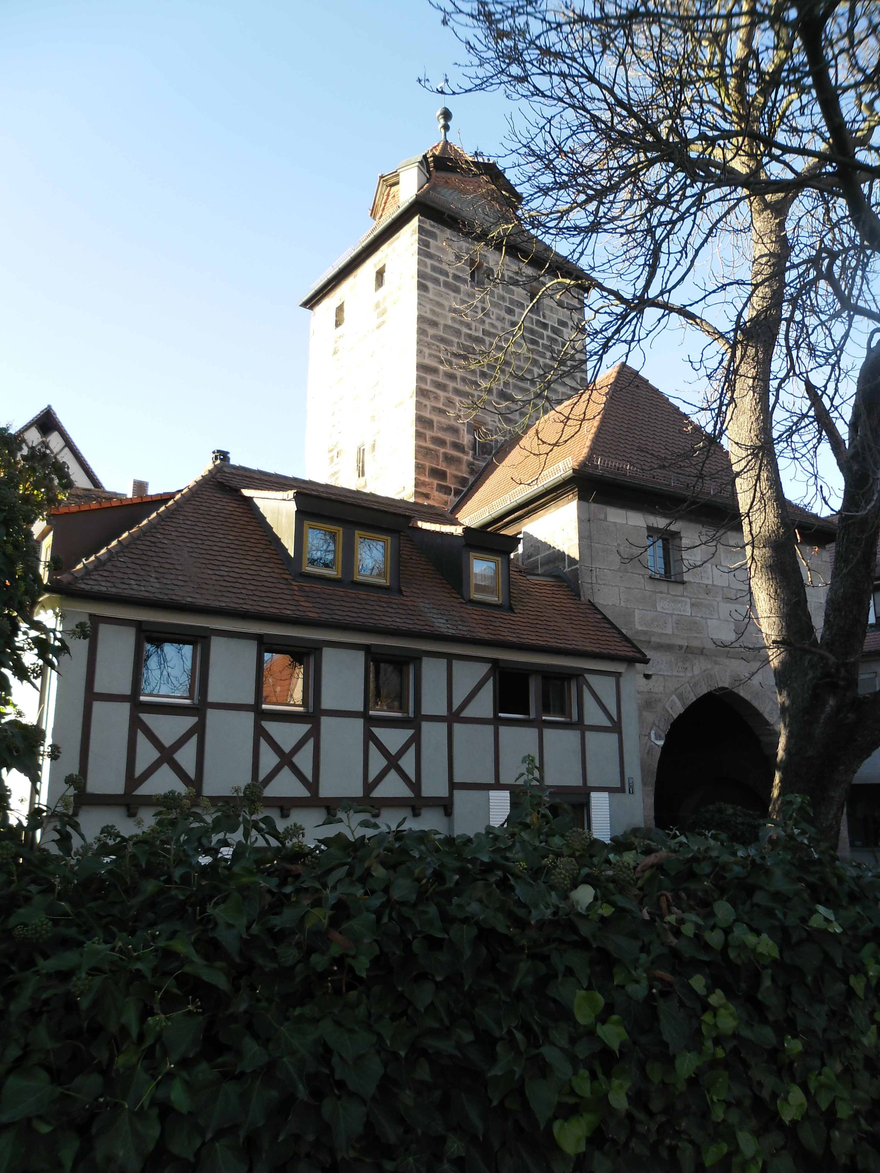 Torturm mit Vorwerk von der Brückenstraße gesehen